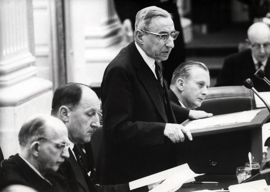 Minister-President Prof. de Quay aan het woord in de Tweede Kamer over de TV-kwestie Bidault. Nederland, Den Haag, 14 maart 1963.